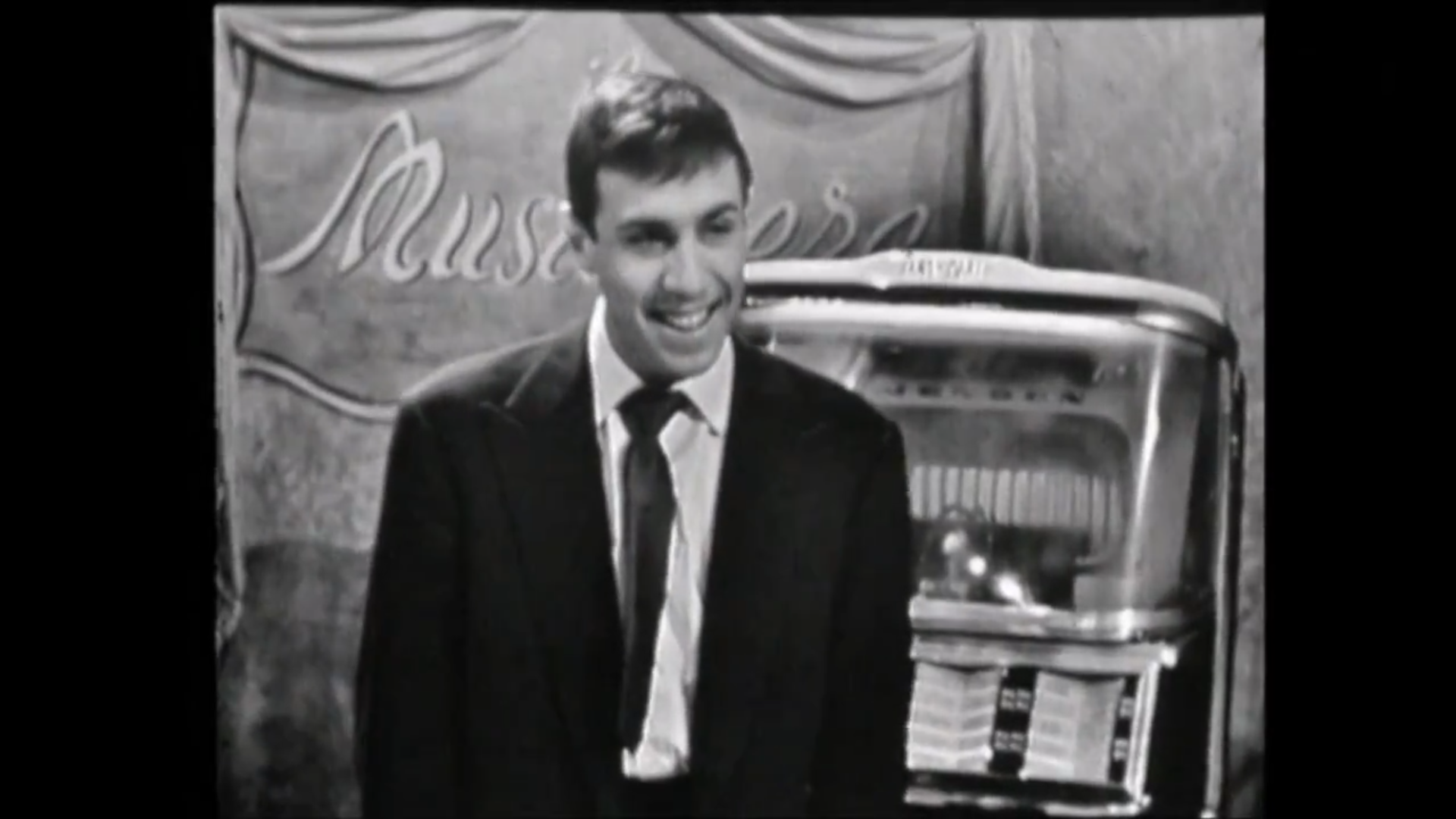 Celentano ne Il musichiere nel 1959, alla sua prima apparizione televisiva